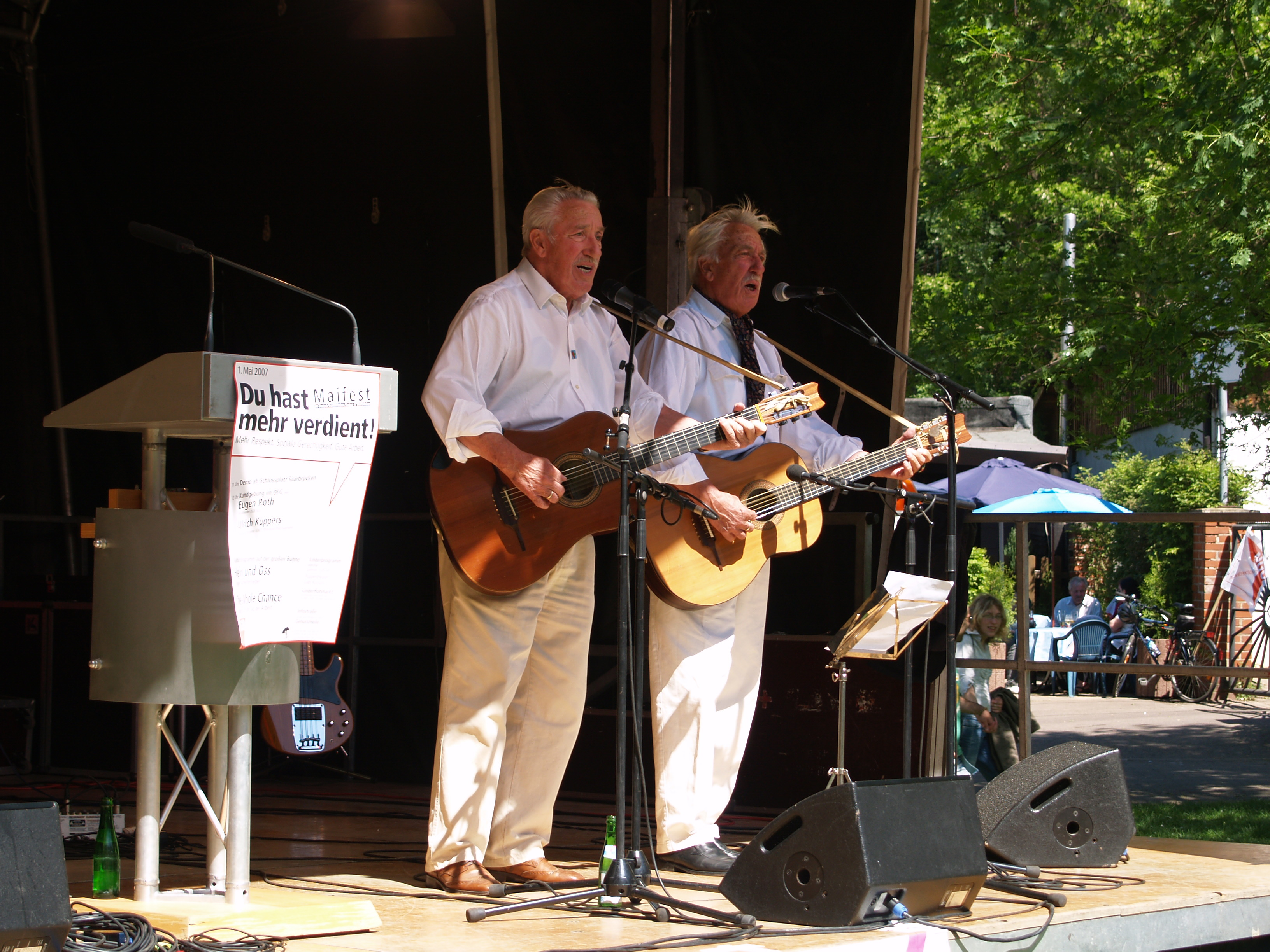 Hein und Oss Kröher am 1. Mai 2007, Deutsch-Französischer Garten (DFG), Saarbrücken